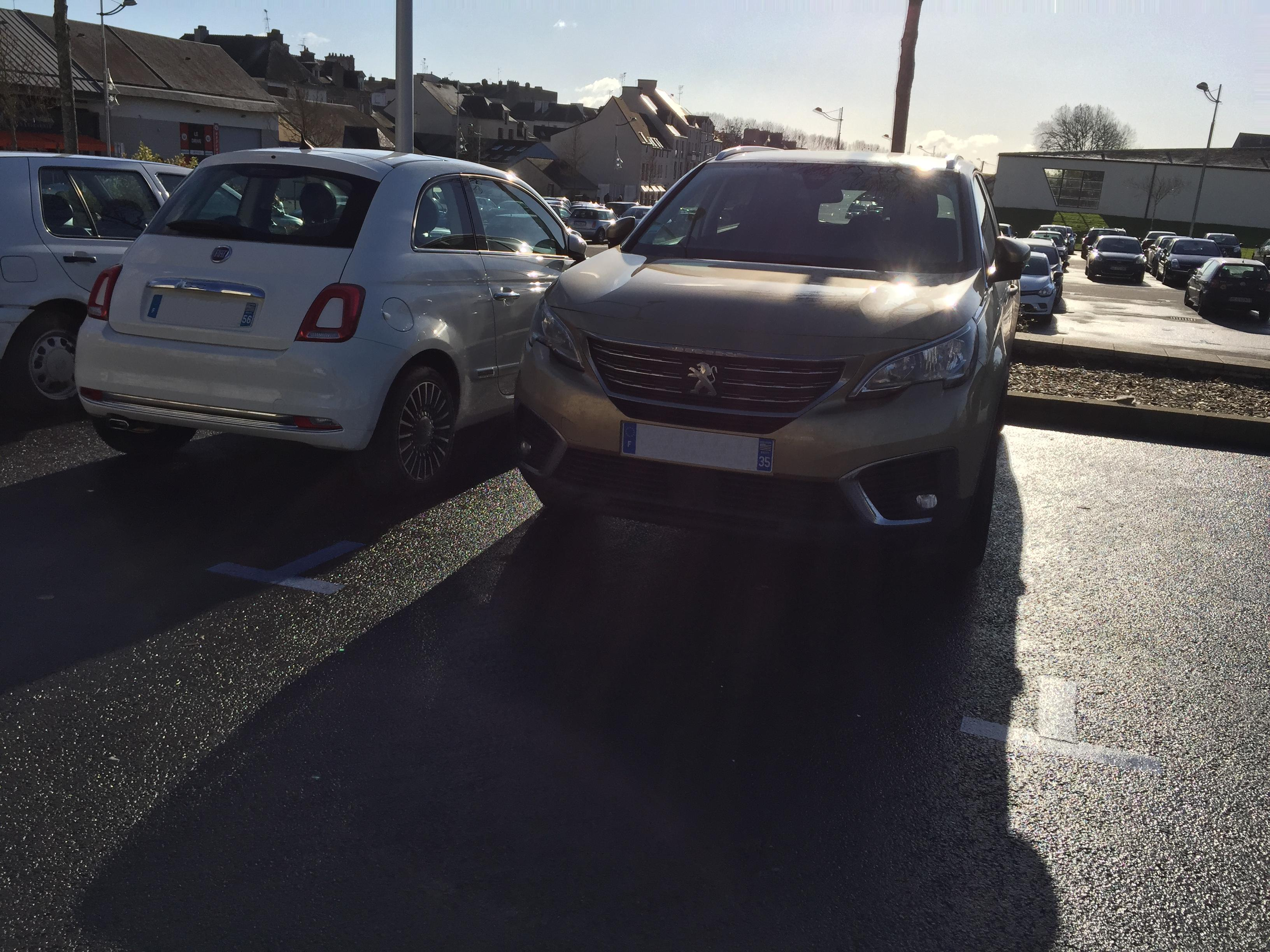 Peugeot 5008